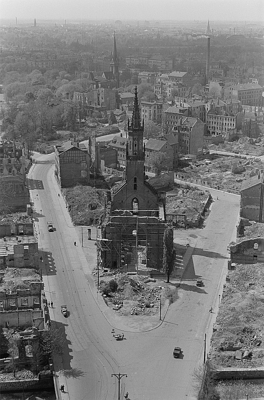 Original image description from the Deutsche FotothekBlick vom Neuen Rathaus auf die Ruine der Trinitatiskirche